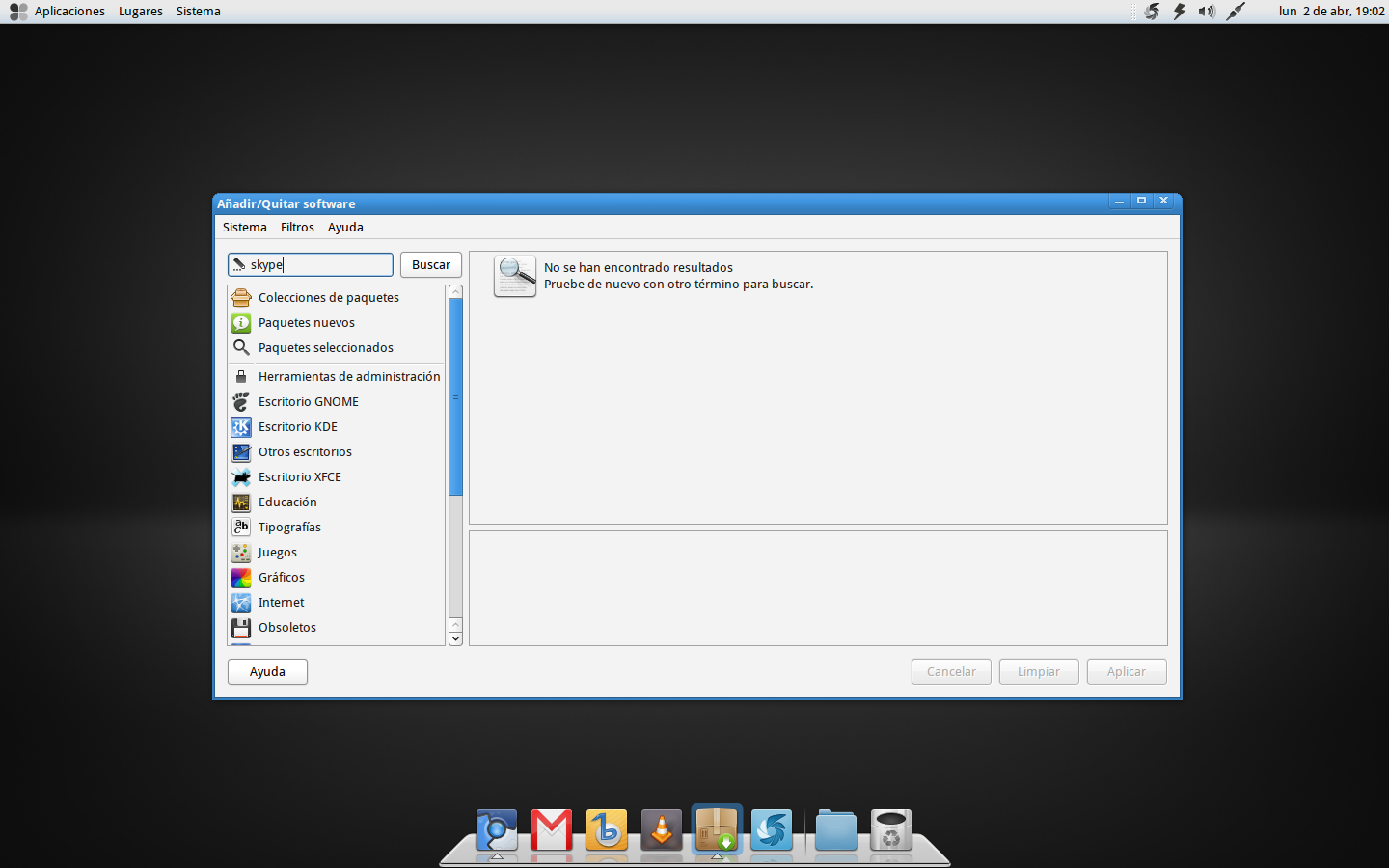 Escritorio Fuduntu 2012.2 en mi notebook